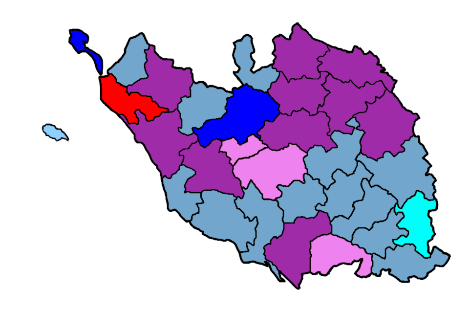 Représentation des cantons par parti politique